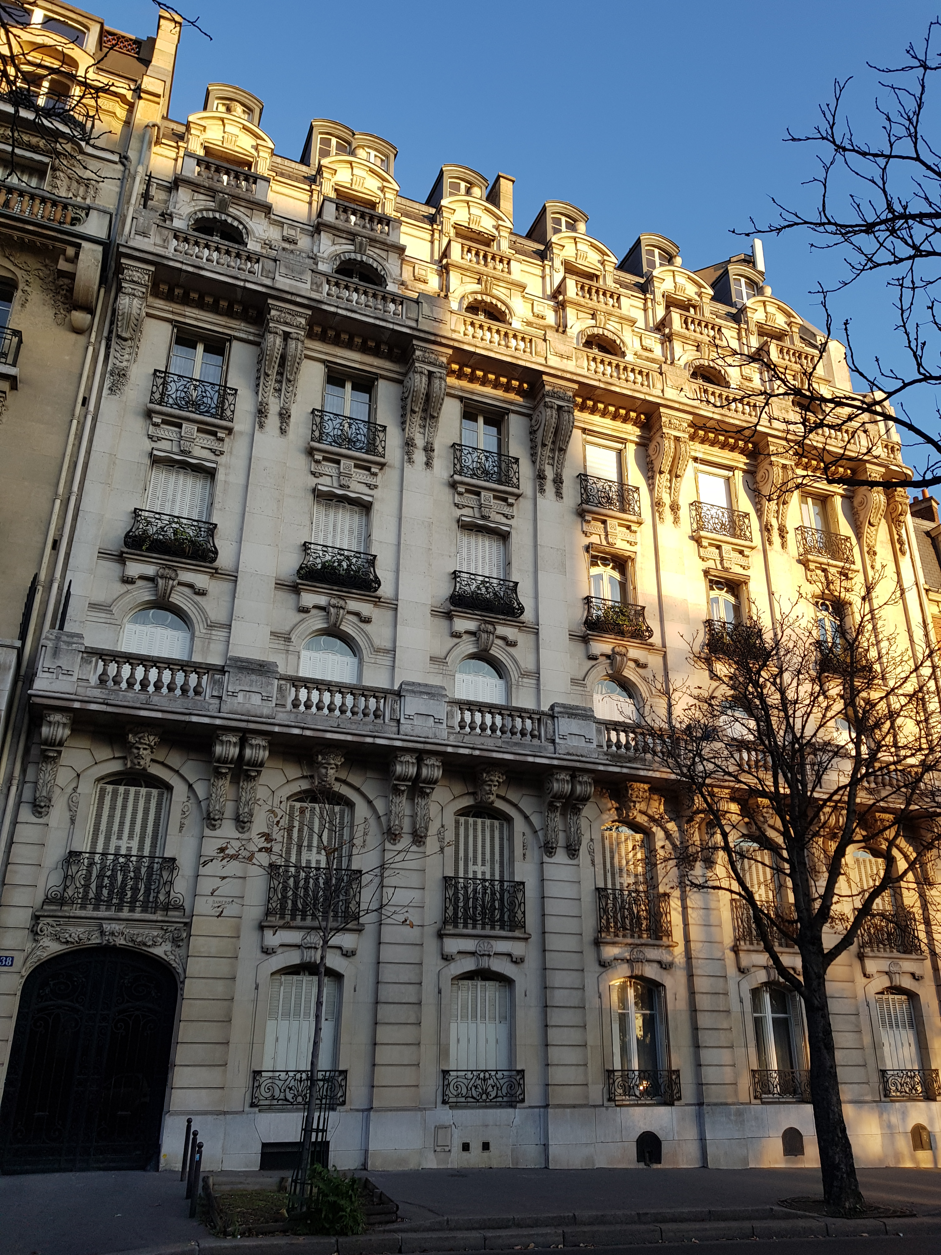 Immeuble de 1907, conçu par l'architecte E. Dameron, 38, avenue du Président-Wilson, Paris 16e.